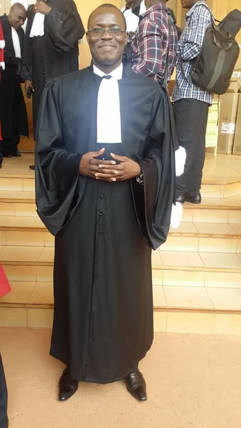 Obtenant son inscription au Barreau du Burkina Faso sur le fondement de son titre d’agrégé des Facultés de droit, Abdoulaye Soma a prêté serment le 3 août 2016 devant la Cour d'appel de Ouagadougou. Il pose pour la première fois dans sa "robe noire" à la sortie de l'audience.